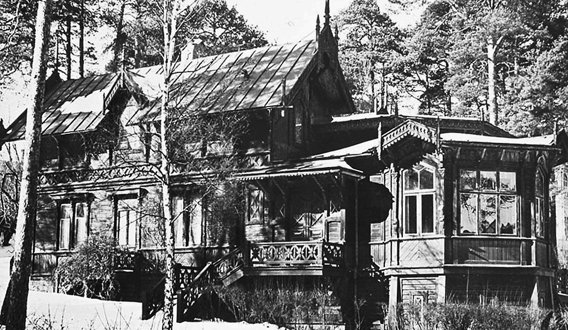 Huset uppfördes 1885 som sommarhus för byggmästaren Jöns Peter Holmberg från Stockholm efter ritningar av arkitekt Ernst Haegglund. 1966 revs villan för att ge plats åt Scania-Vabis personalbostäder. Matsalen och verandan bevarades och skänktes till Torekällbergets museum